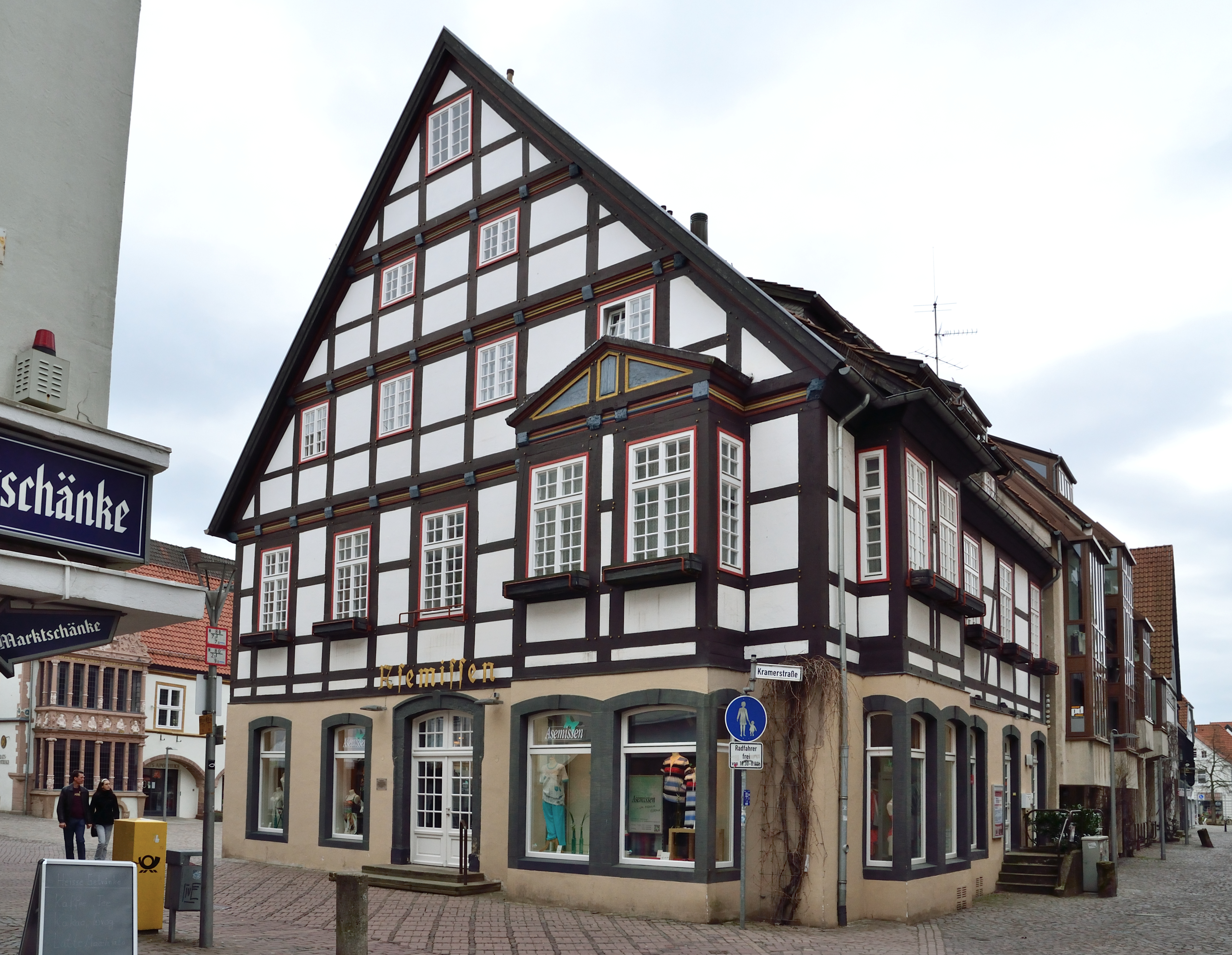 This is a photograph of an architectural monument.It is on the list of cultural monuments of Lemgo Fachwerkhaus